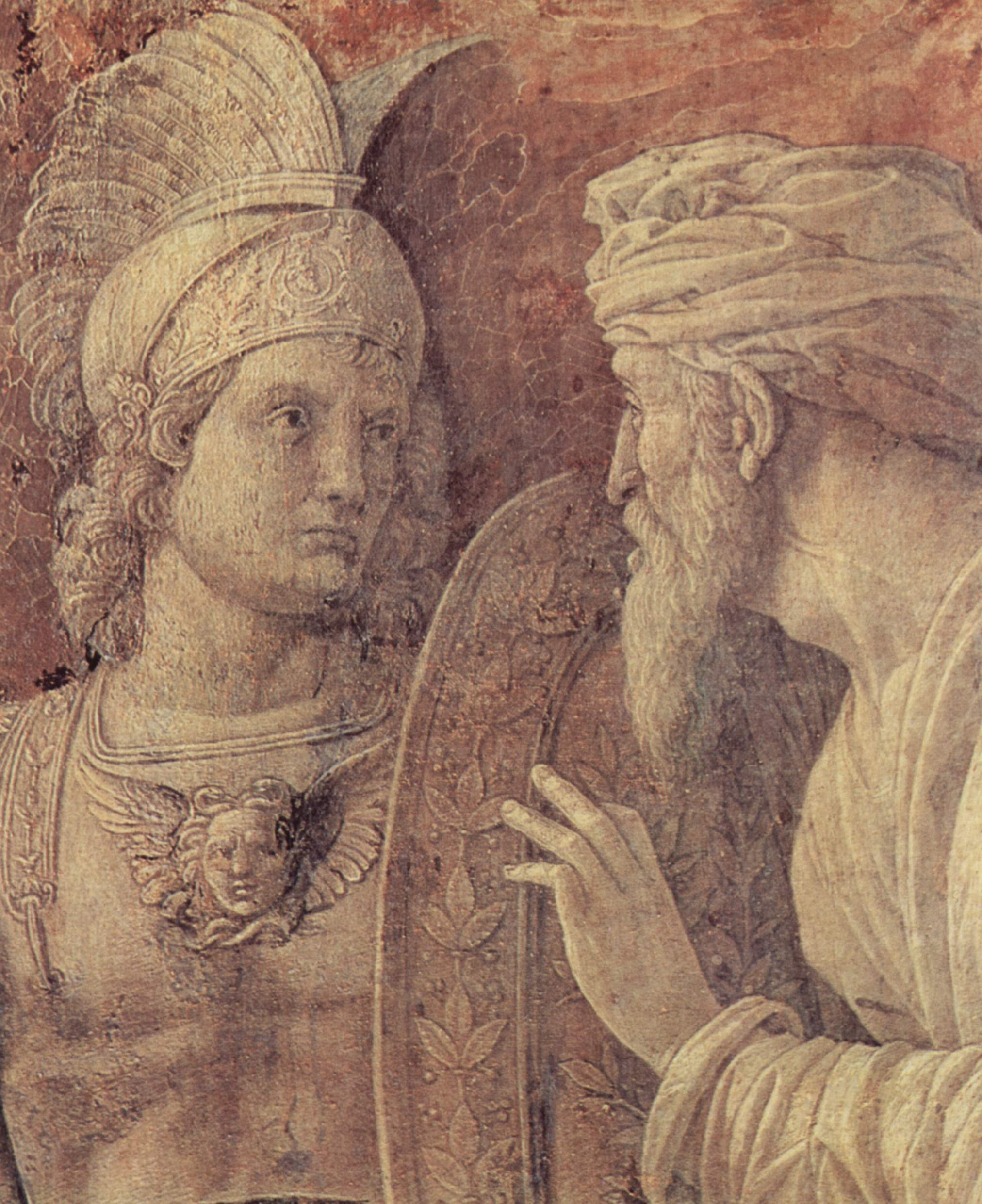 detail